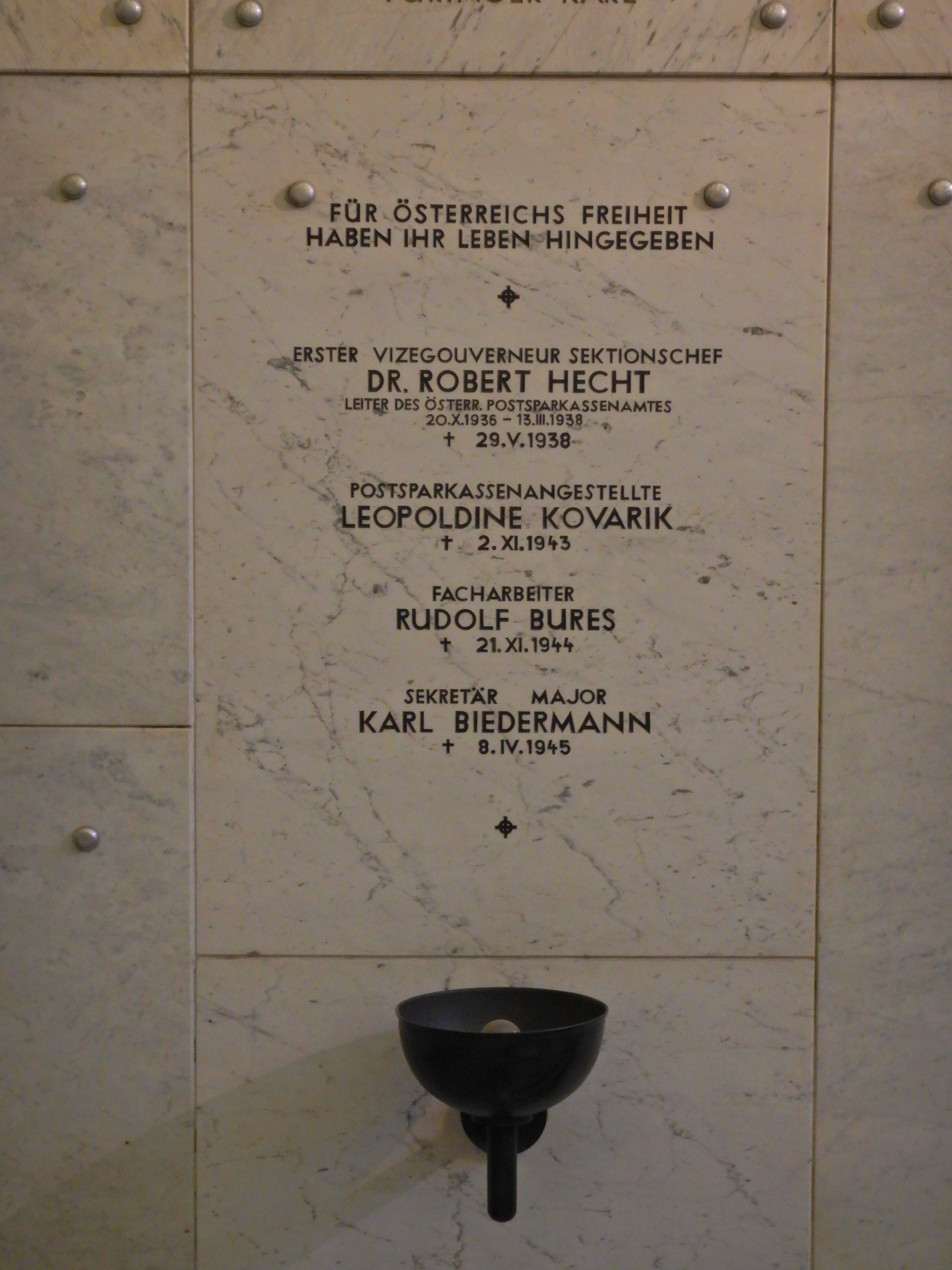 Gedenktafel für Robert Hecht, Leopoldine Kovarik, Rudolf Bures und Karl Biedermann am Georg-Coch-Platz 2